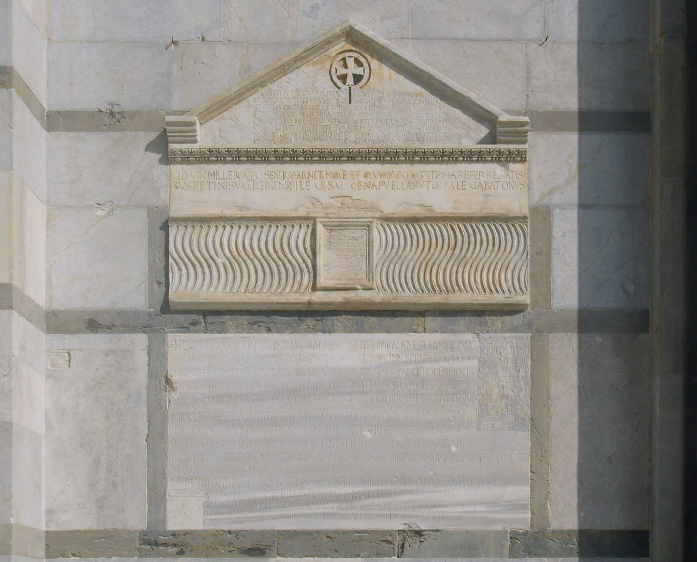 Duomo di Pisa, l'epitaffio (primo ventennio del XII secolo) in distici elegiaci di Buscheto “nuovo Dedalo”, al di sopra di una lastra frontale di sarcofago romano strigilato, di recupero.